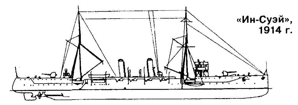 Схема крейсера "Ин-Суэй"